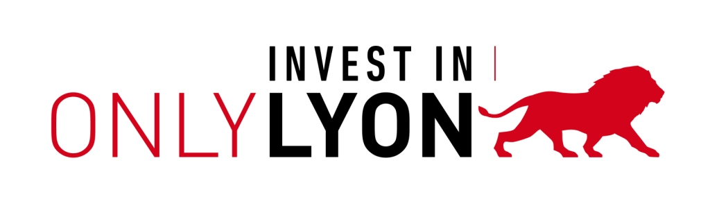 Logo Aderly Invest in Lyon 2013